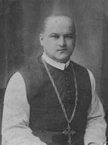 Tecellin Jaksch (1885 - 1954), Český cisterciácký mnich německého původu a opat vyšebrodského kláštera.